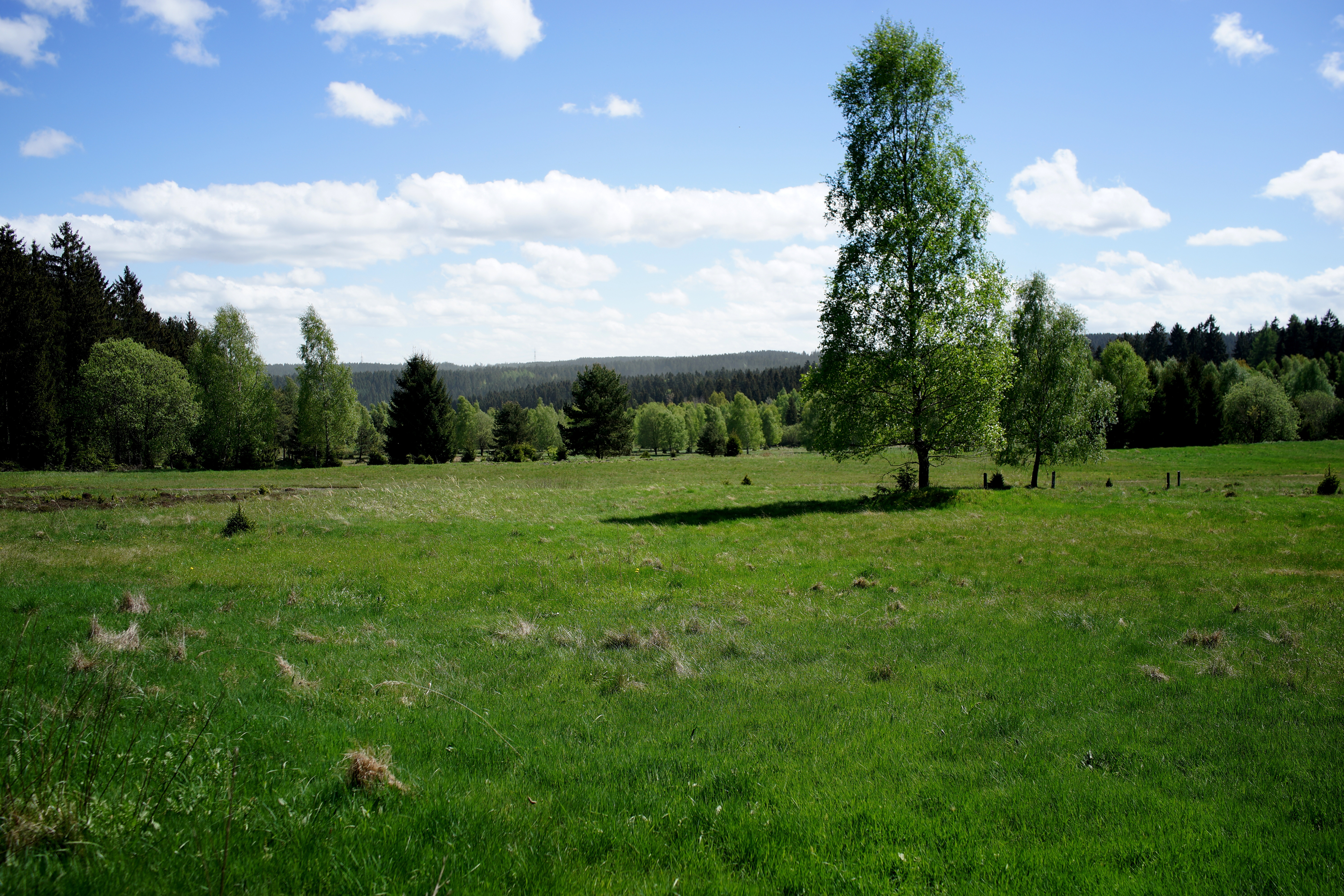 Offenlandbereich im Naturschutzgebiet Mittelgrund